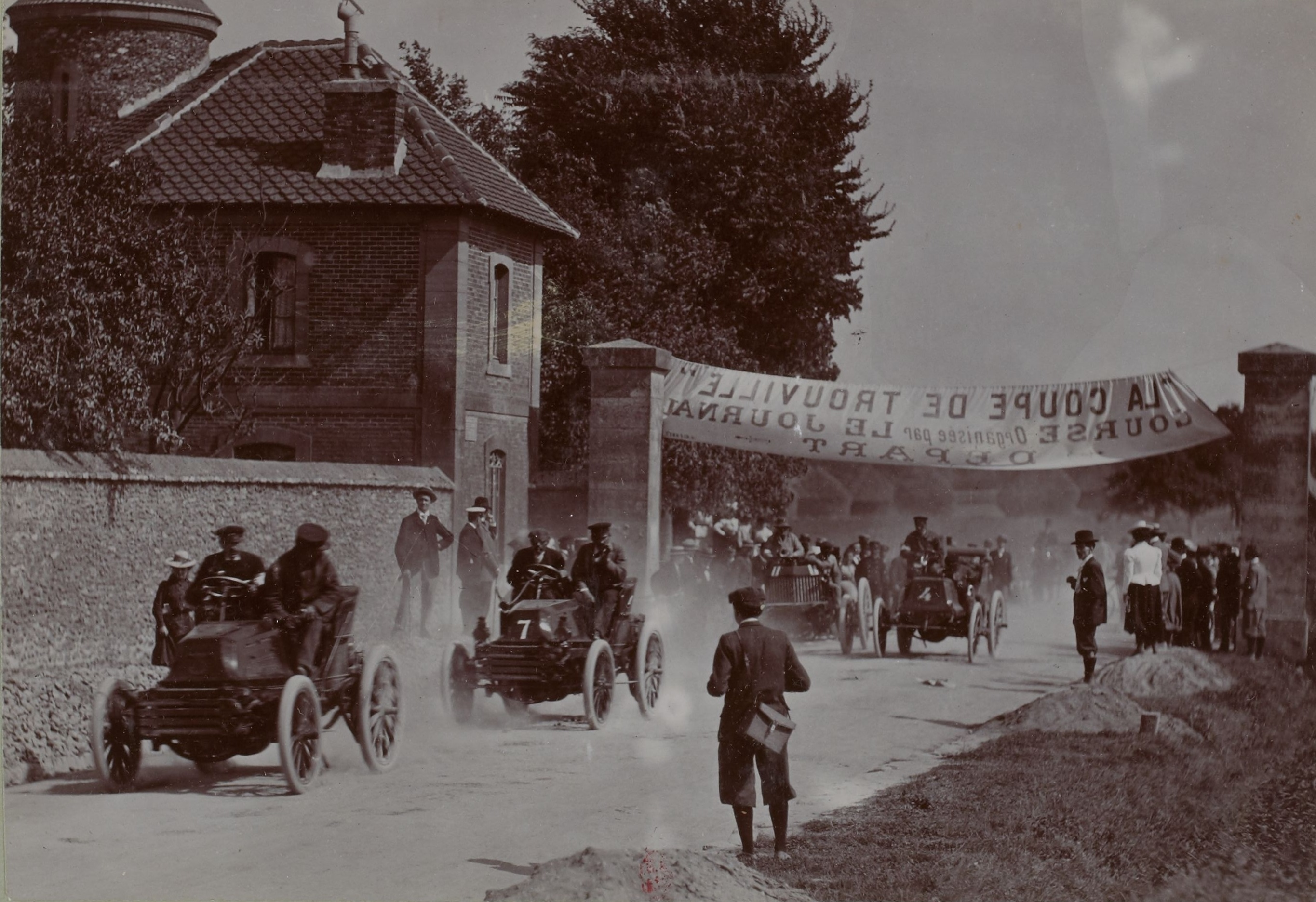 [Collection Jules Beau. Photographie sportive] : T. 10. Année 1899 / Jules Beau : F. 19v. [Coupe de Trouville, 26 - 27 août 1899]